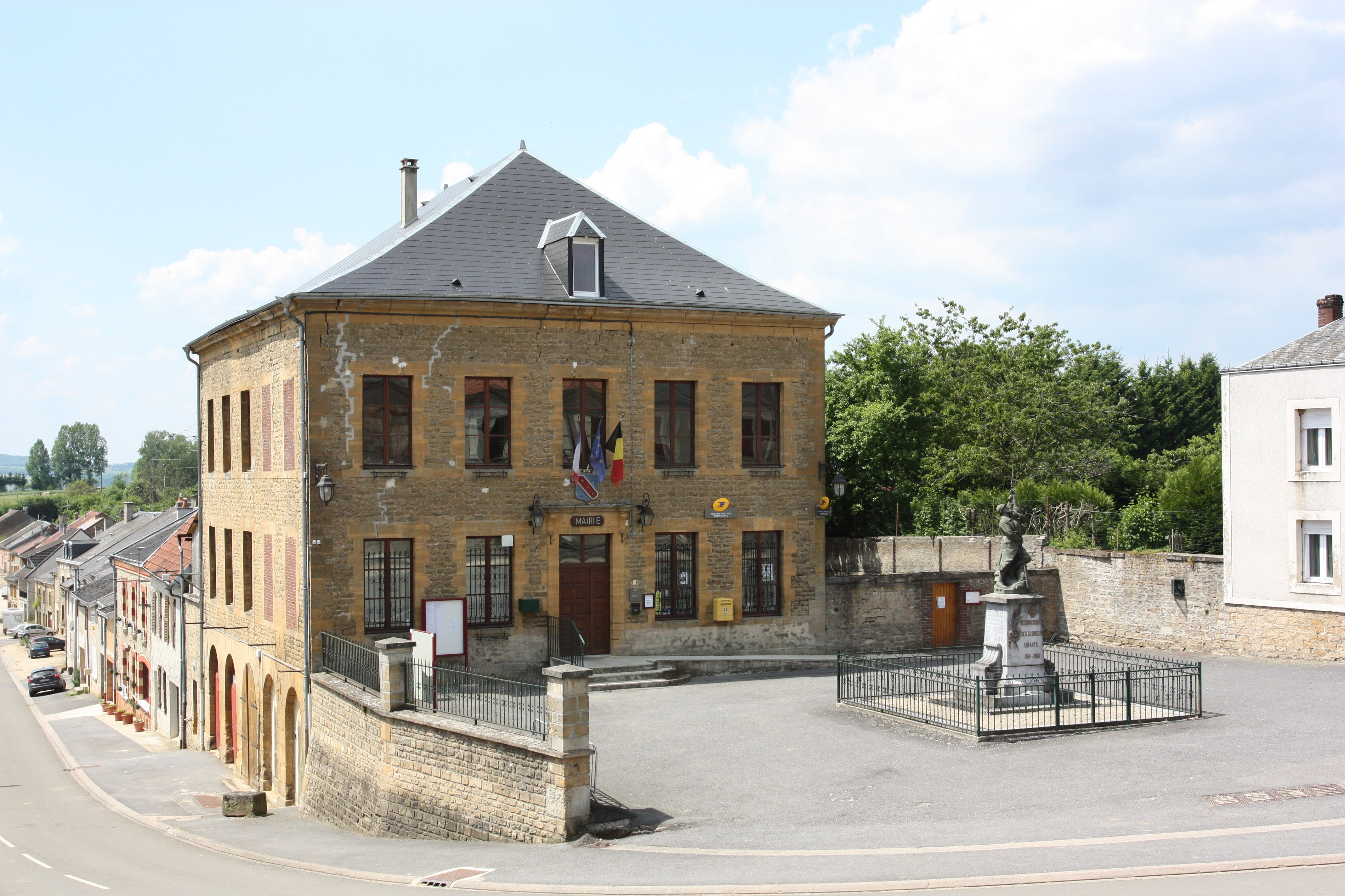 Messincourt la Mairie Photo Francis Neuvens les Ardennes vues du sol